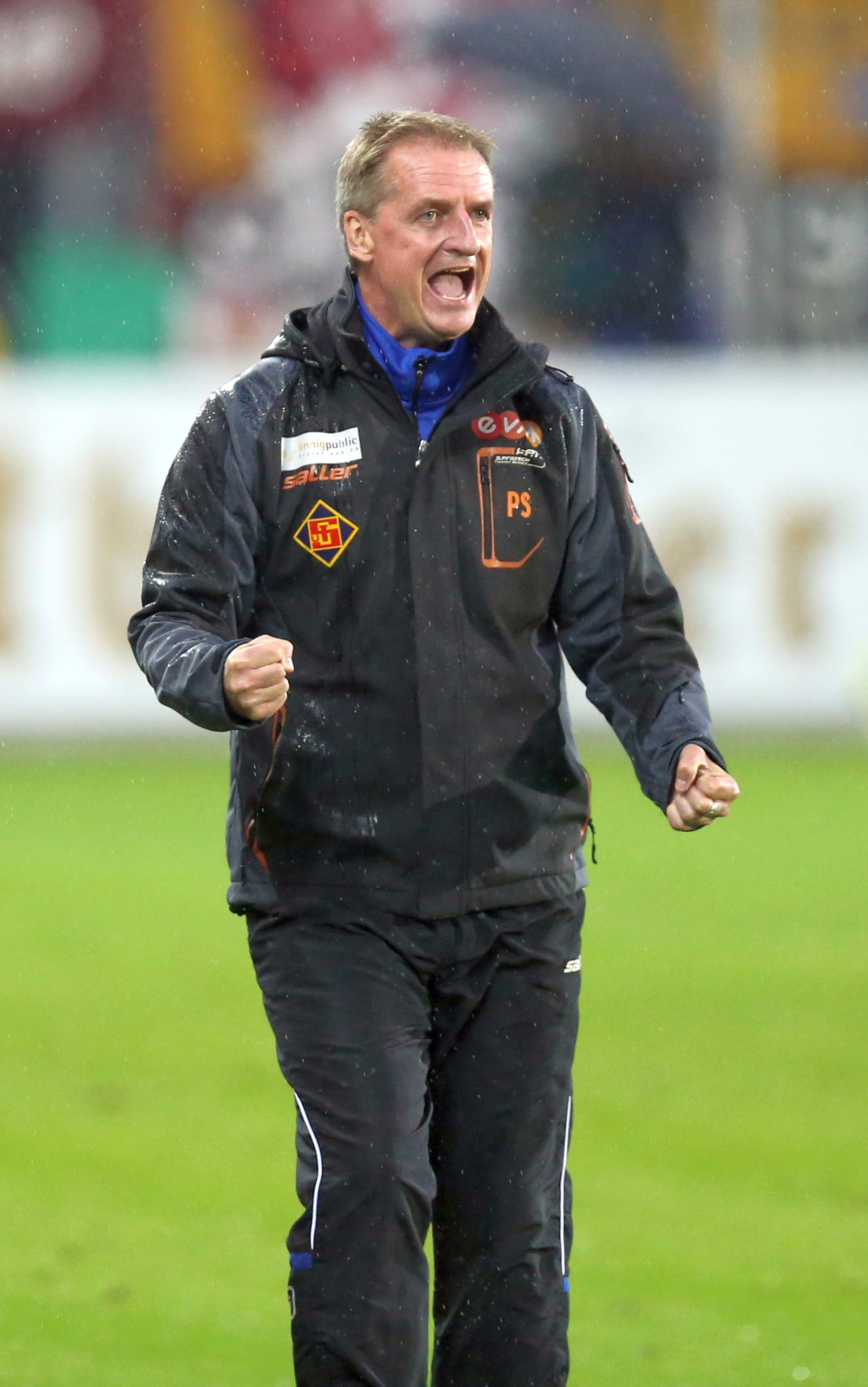 DFB-Pokal 2017/18, 1. Hauptrunde, TuS Koblenz gegen SG Dynamo Dresden: Petrik Snder (TuS Koblenz)